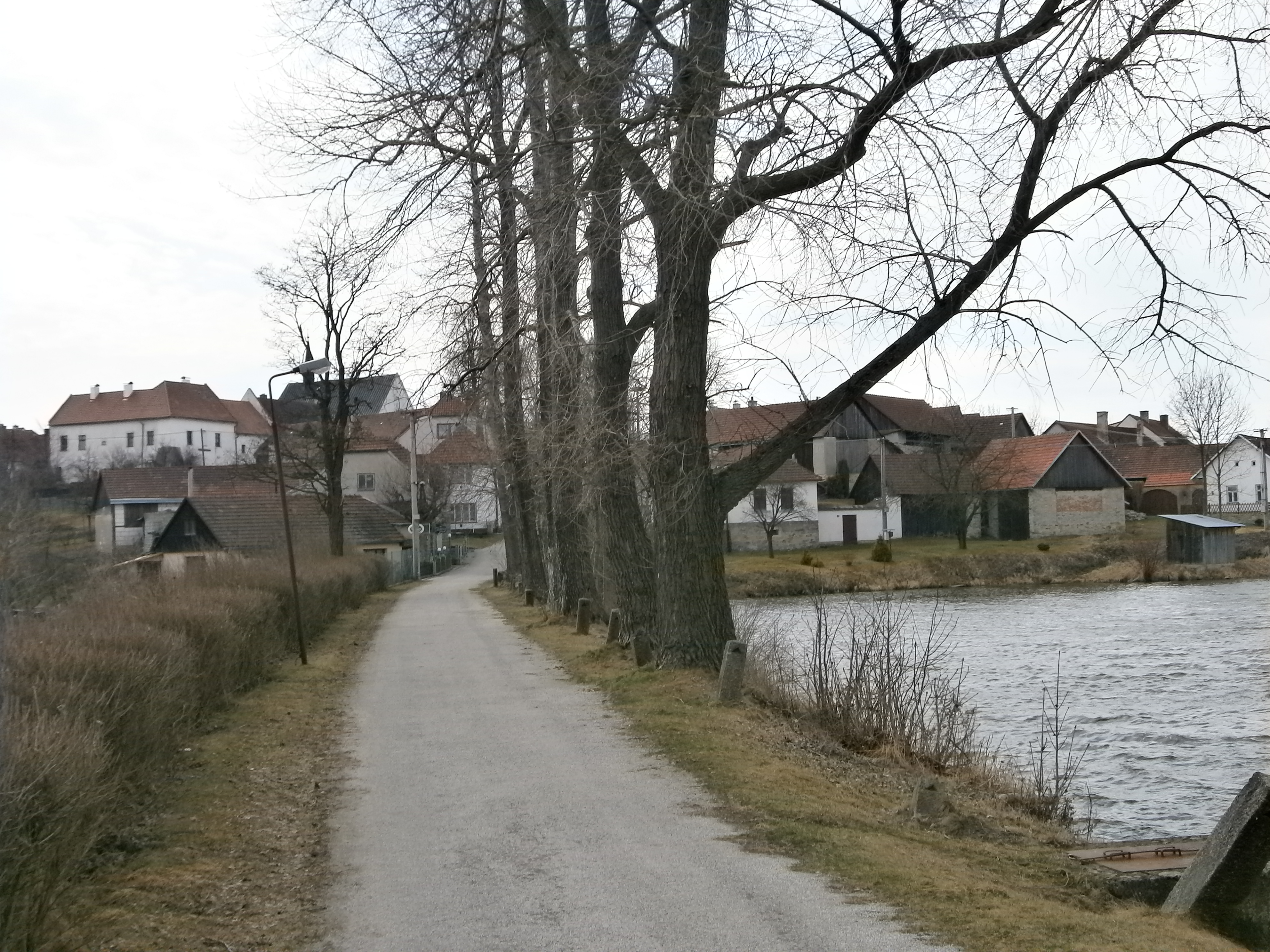 Česky: Celkový pohled na obec Ronov (Ořechov) od vlakové zastávky